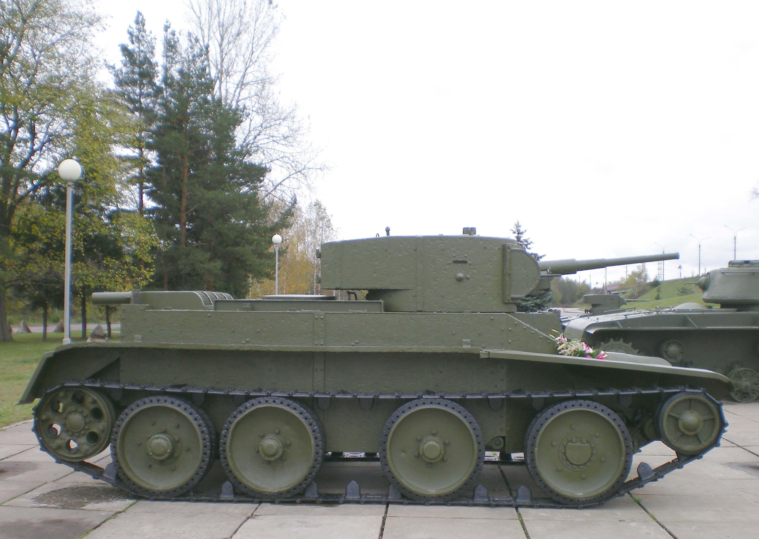 Танк БТ. Вид справа. Диорама «Прорыв блокады Ленинграда». Экспозиция военной техники периода 1941–1944 годов под открытым небом.